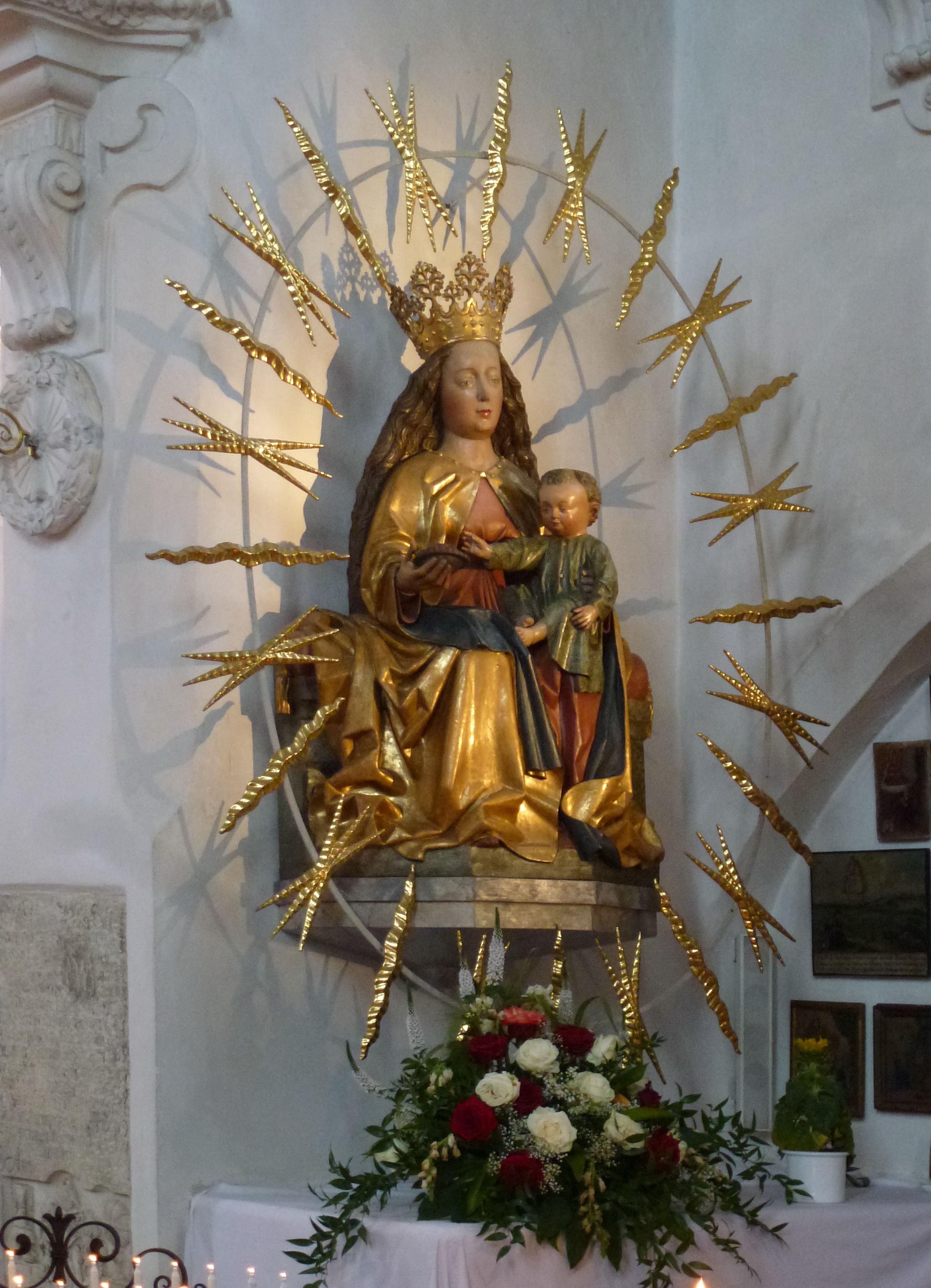 Aufkirchen (Kr. Starnberg), Marienplatz 3: Katholische Pfarrkirche St. Mariä Himmelfahrt: Das Gnadenbild zeigt im Strahlenkranz Maria mit dem Jesuskind, das nach der Schale mit den Trauben greift (Symbol für die Passion)